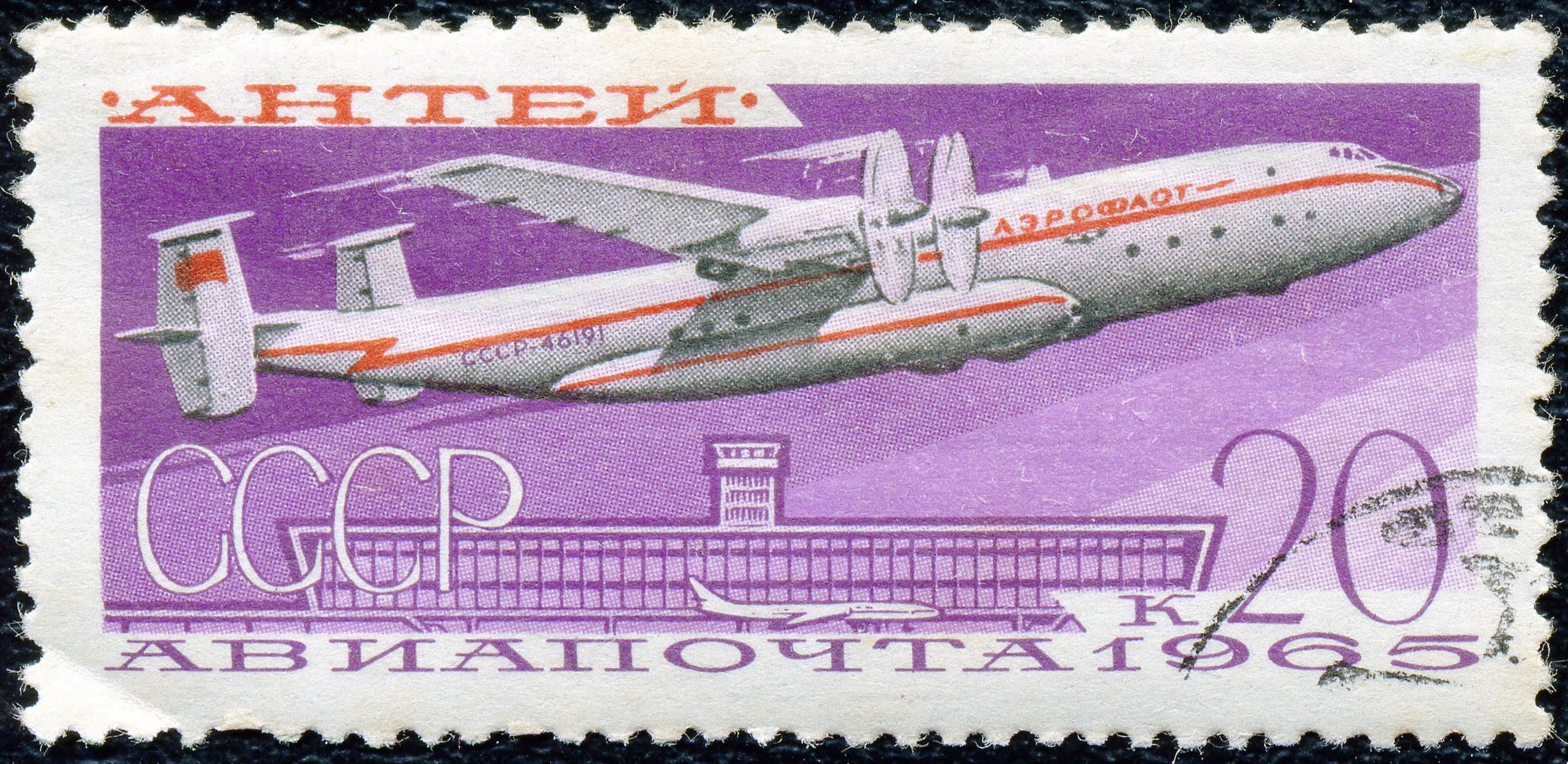 Почтовая марка СССР. 1965. Ан-22